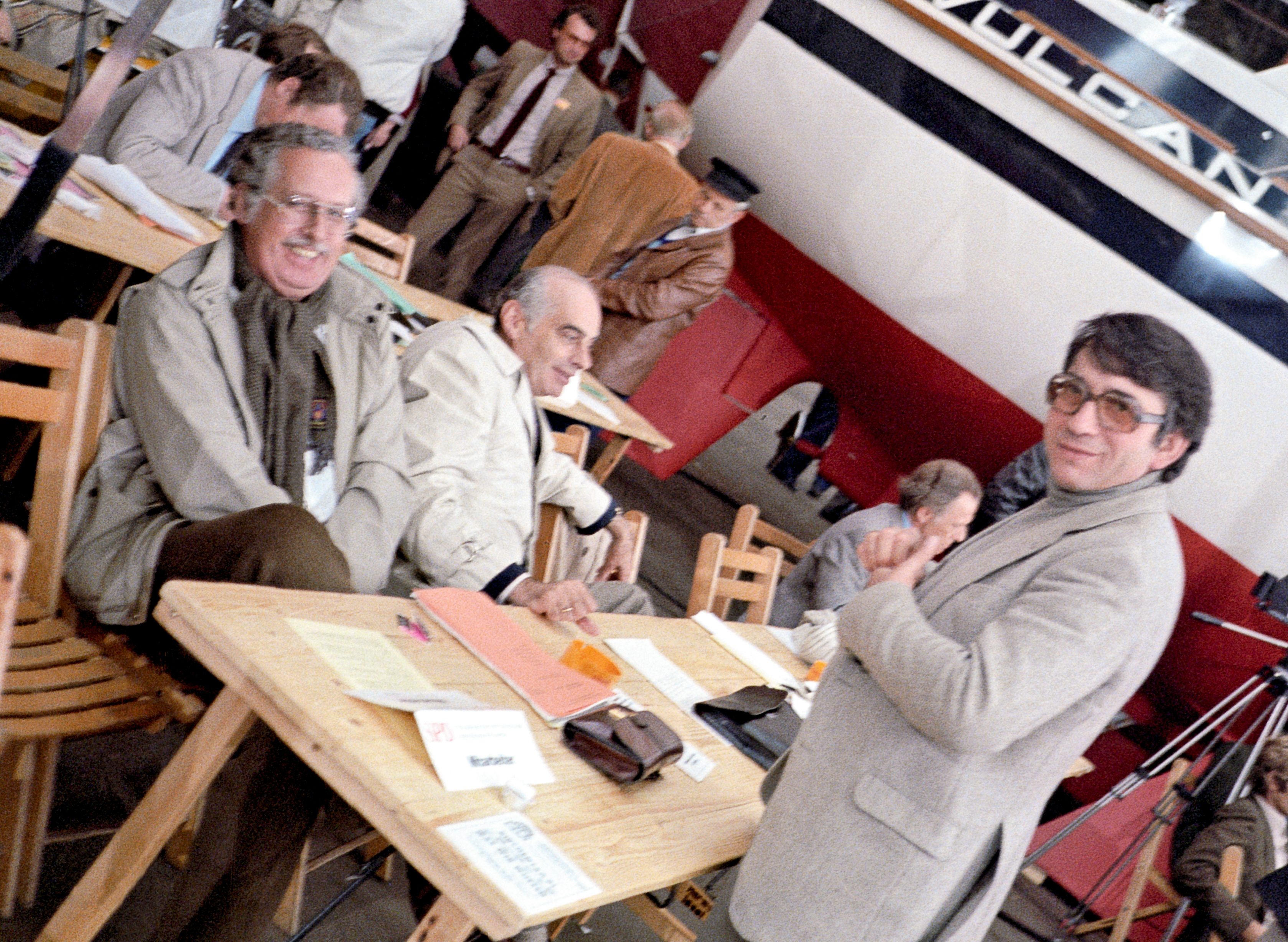 Von links: die Hamburger Journalisten Uwe Bahnsen, Herbert Schütte und der Bürgershaftsabgeordnete Bodo Fischer auf einem SPD-Parteitag in Hamburg